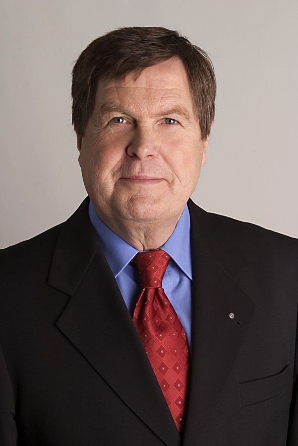 Porträt des Politikers Dieter Steinecke (CDU), Magdeburg